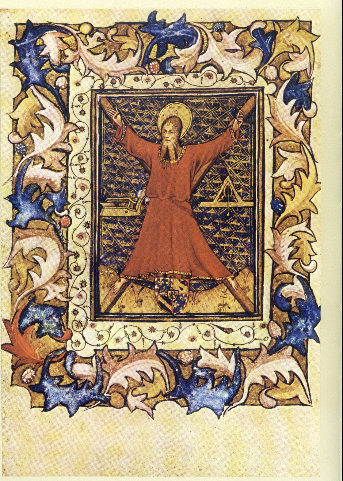 Miniatur